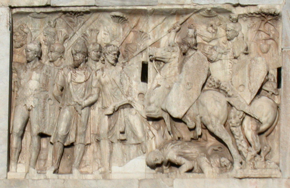 Roma, Arco di Costantino presso il Colosseo, lato ovest, pannelli del Grande fregio traianeo sul lato dell'attico. Foto personale (maggio 2005) by MM in it.wiki